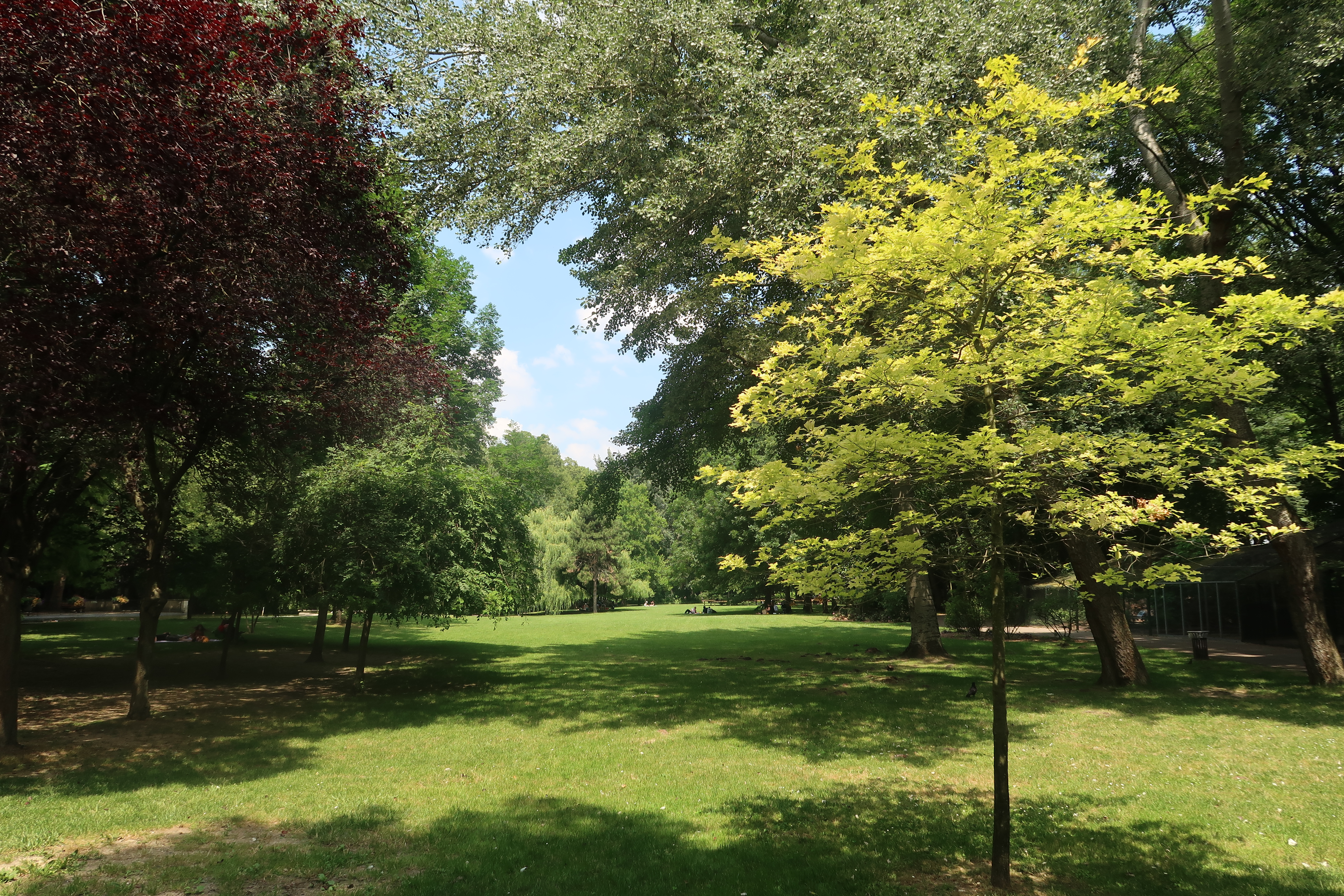 Parc du château à Suresnes (Hauts-de-Seine).